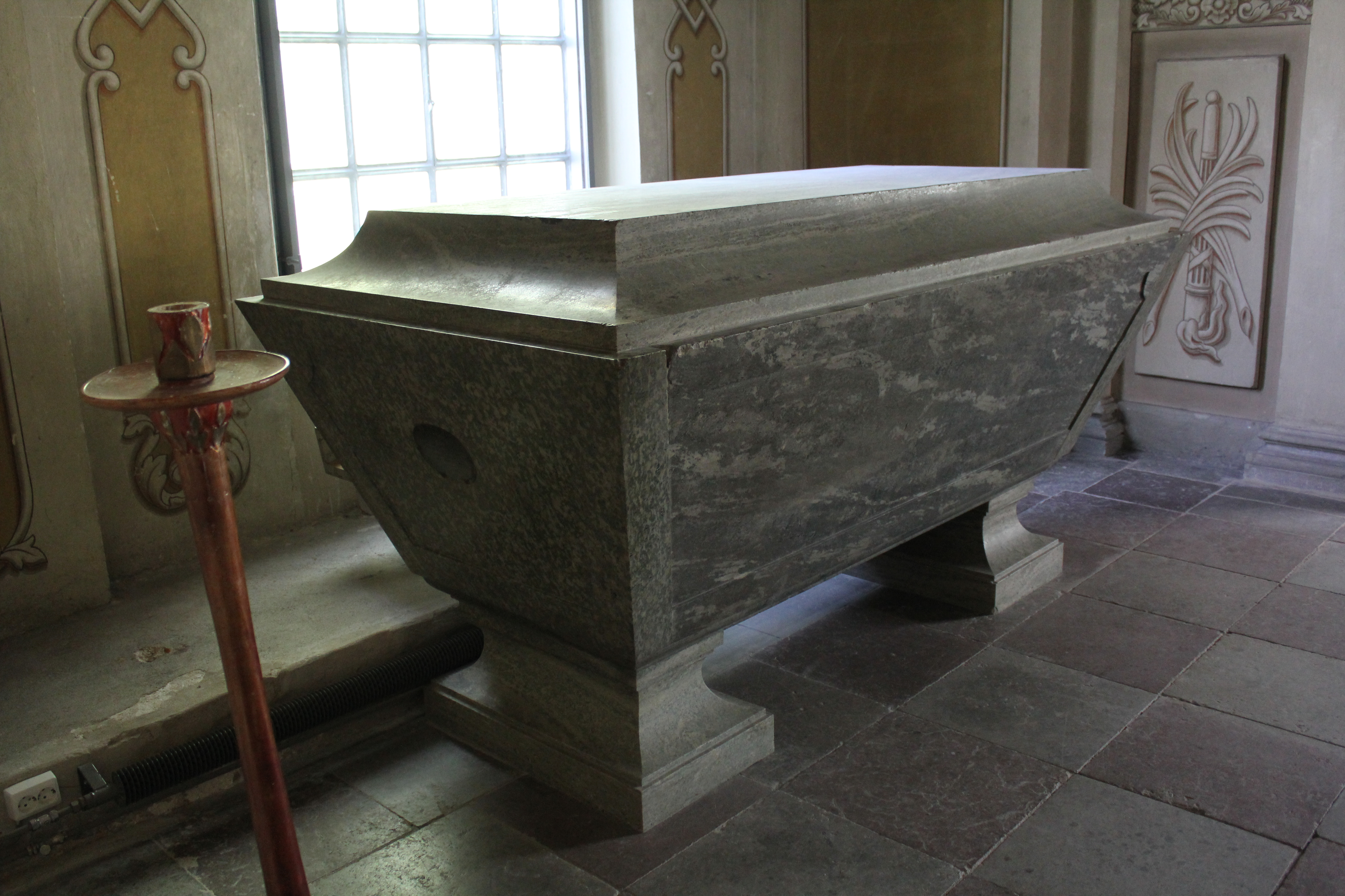 Pontus Fredrik de la Gardies sarkofag i de la Gardies gravkor, Veckholms kyrka, Enköpings kommun.